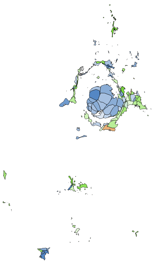 顏色對照表